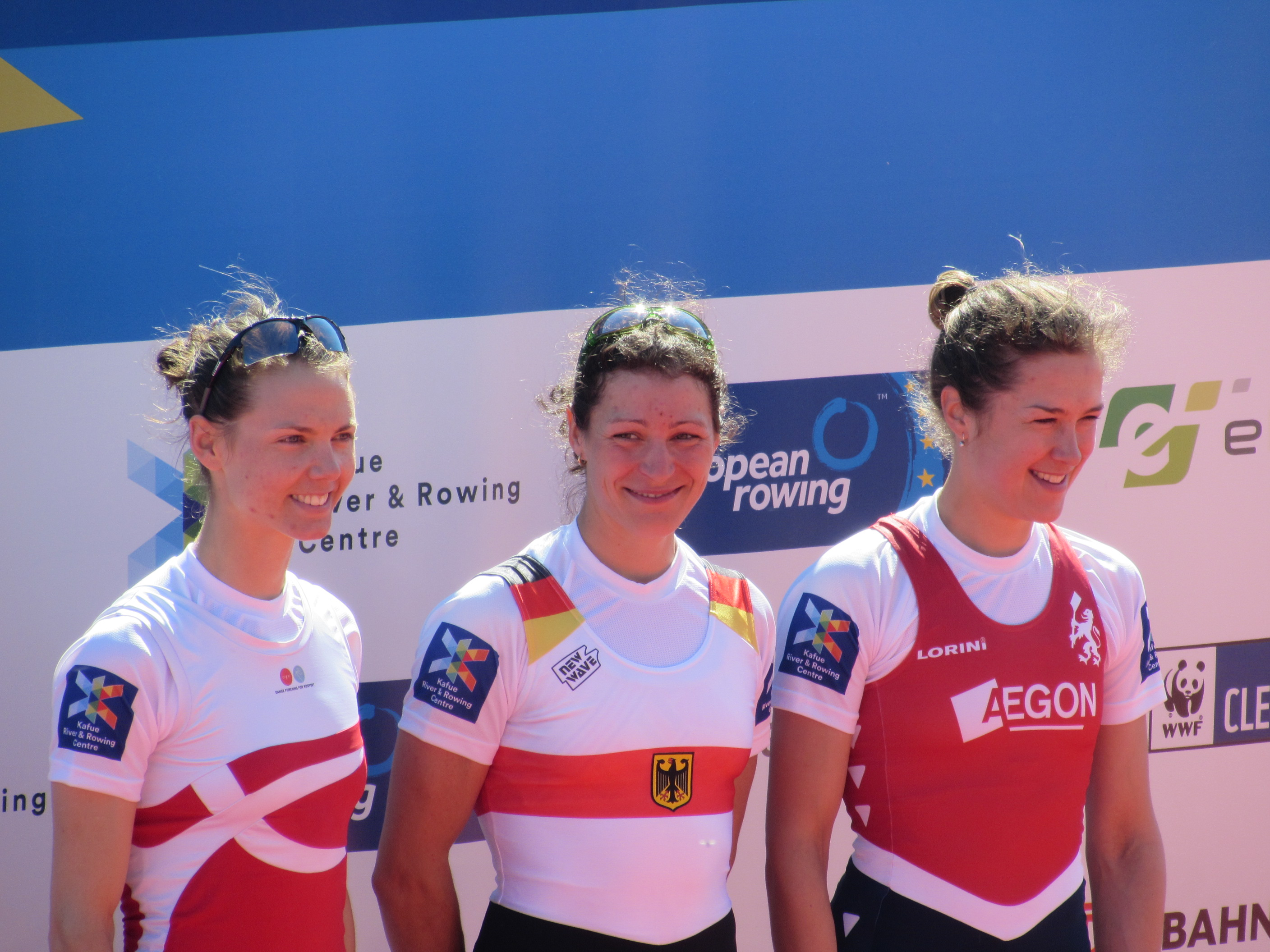 Aja Runge Holmegaard, Anja Noske und Elisabeth Woerner bei der Siegerehrung der Ruder-EM 2016